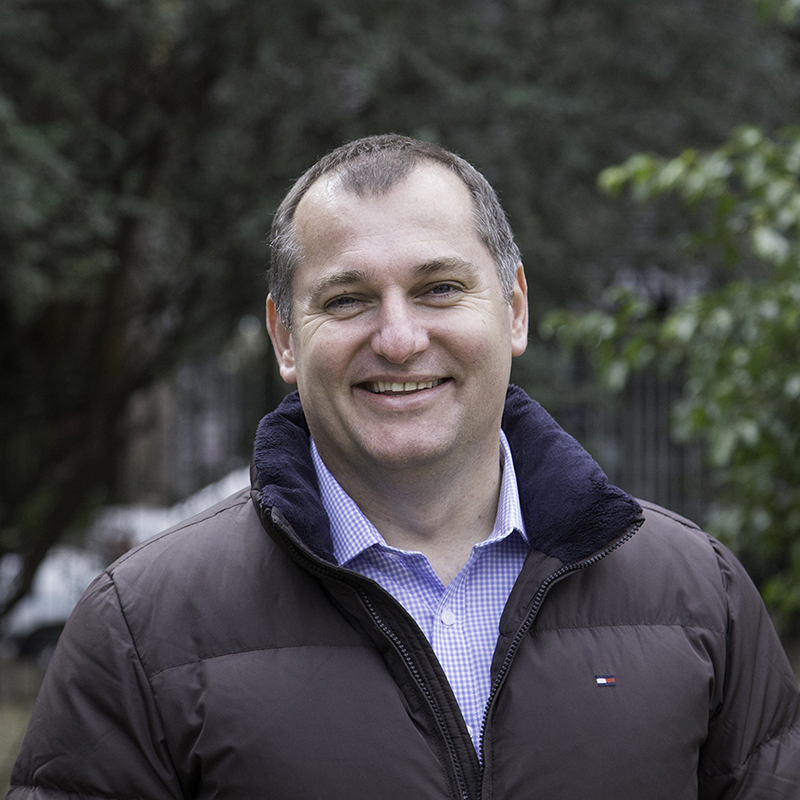 Hernán Abel Rossi, legislador porteño.